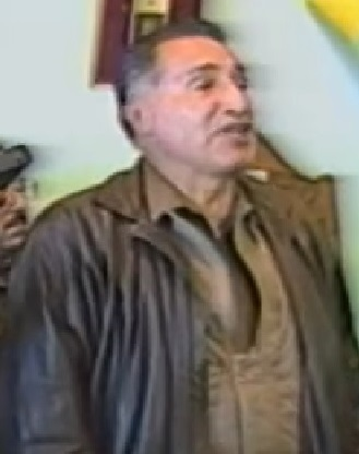 34° Vicepresidente de Bolivia